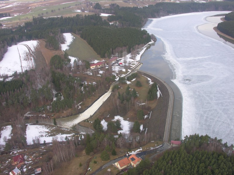 Přehrada Mostiště u Velkého Meziříčí